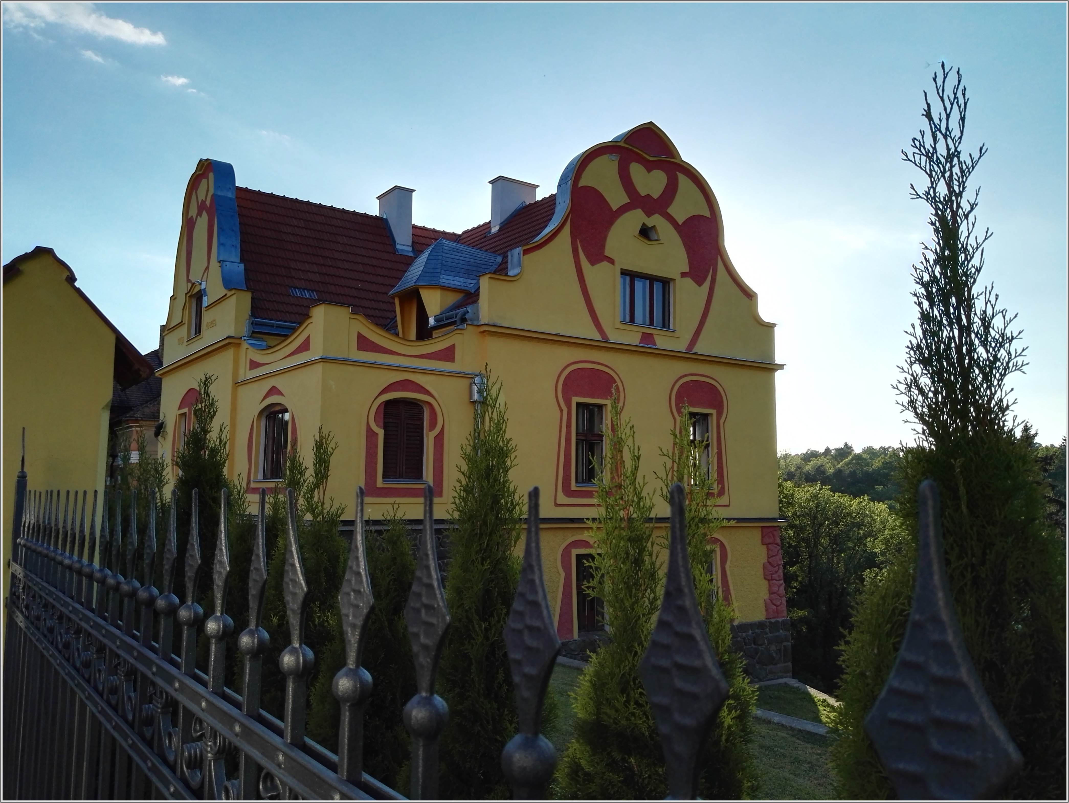 Bílkova vila, Příběnická 738, Tábor.